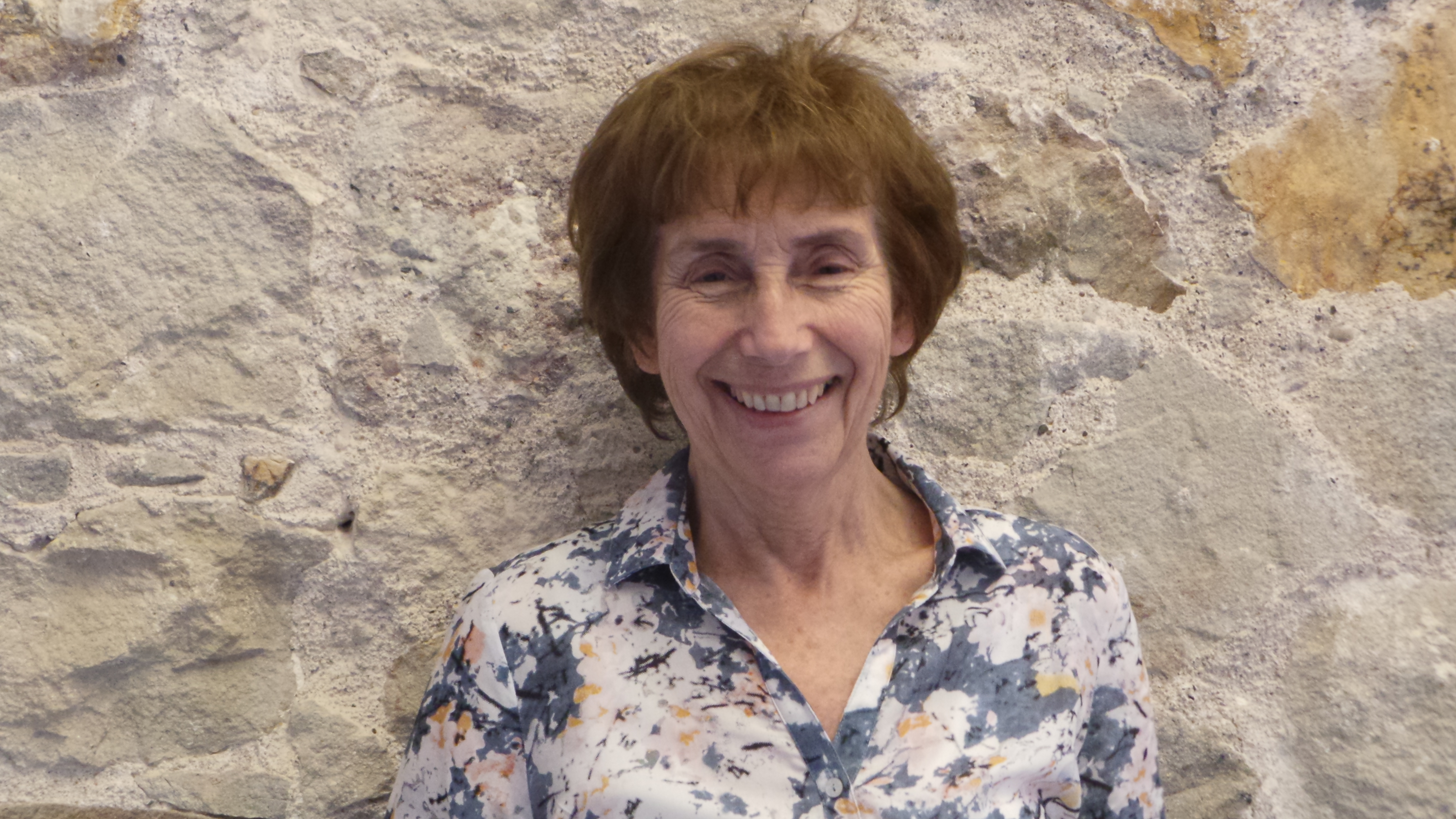 Inauguración Espai Viquidones Wikimujeres en la UPF. Mayo de 2016